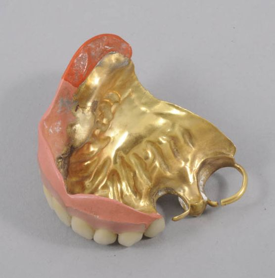 Bon état ; 24/11/2010; Original caption: "prothèse dentaire composée d’un palais en or avec deux anneaux pour les dents restantes. Onze dents en porcelaines. Entre le palais et les dents, caoutchouc (vulcanite) de couleur rouge."